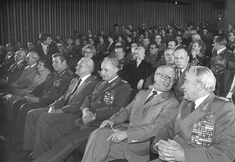 Berlin, Aufführung NVA-Dokumentarfilm ADN-ZB Mittelstädt 10.2.81 Berlin: Der NVA-Dokumentarfilm "Dem Frieden verpflichtet", der dem X.Parteitag des SED und dem 25.Jahrestag der NVA gewidmet ist, erlebte im Filmtheater "International" seine festliche Aufführung.Er berichtet vom Manöver "Waffenbrüderschaft 80".Der Uraufführung wohnten bei Erich Honecker, Armeegeneral Heinz Hoffmann (r), Generaloberst Heinz Keßler (3.v.r.), Günter Mittag (4.v.r.), Armeegeneral Michail Saizew (5.v.r.) sowie weitere Persönlichkeiten.-Titel und Funktionen siehe ADN-Meldung